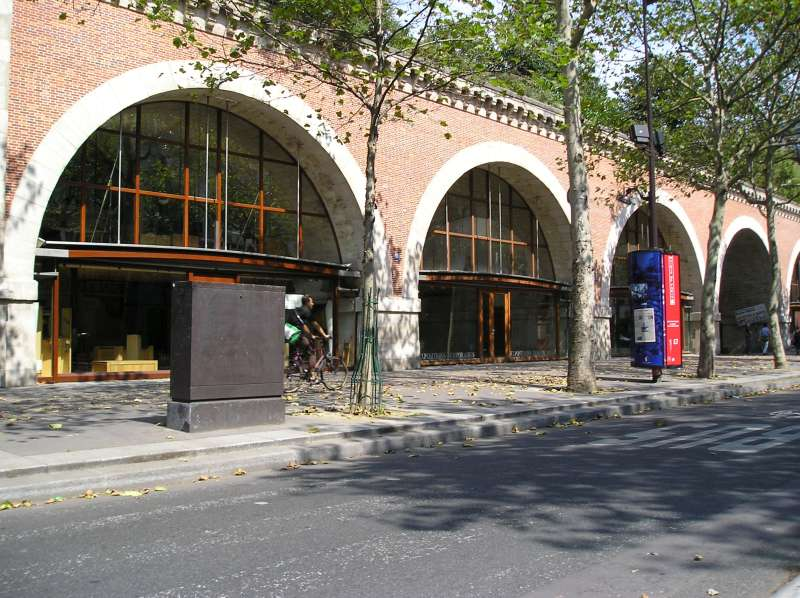 Avenue Daumesnil, dans le 12 arrondissement de Paris.